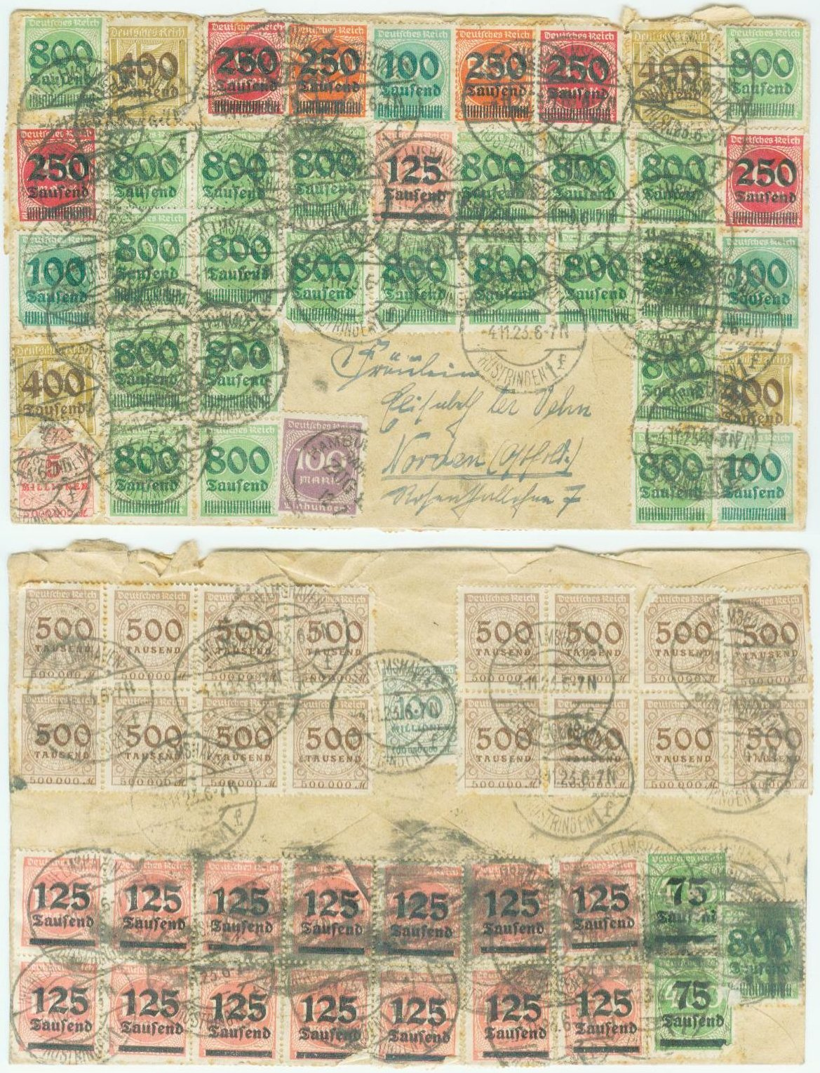 Briefumschlag eines Briefs von Wilhelmshaven nach Norden, gestempelt am 4.11.1923. Briefporto: 134.875.100 Mark